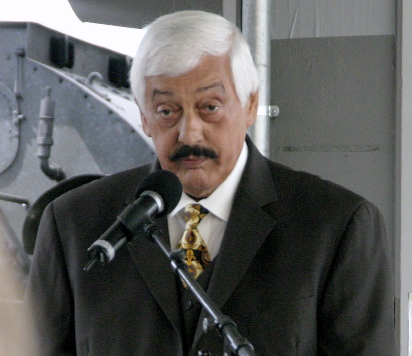 Hugo Adolf Höllenreiner (1933 - 2015) war ein deutscher Sinto und Überlebender des Porajmos (Völkermord an den europäischen Roma in der Zeit des Nationalsozialismus). Er engagierte sich seit Ende der 1990er Jahre als Zeitzeuge. Hier während einer kurzen Rede am 27. April 2009 nach dem Eintreffen des Zuges der Erinnerung in München am selben Tag. Titel: "Hugo Höllenreiner (2009)"